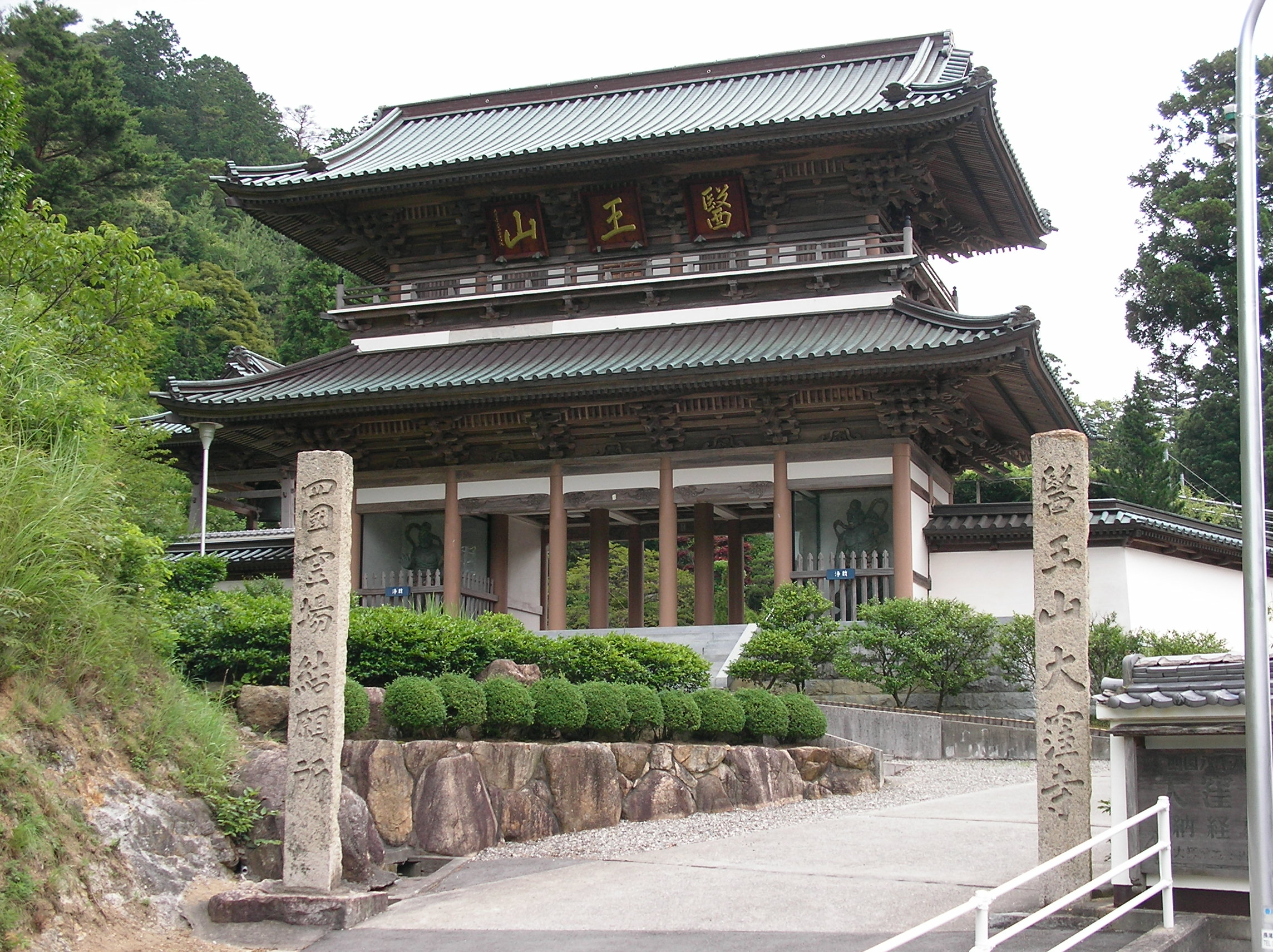 Iozan-okuboji-sanmon